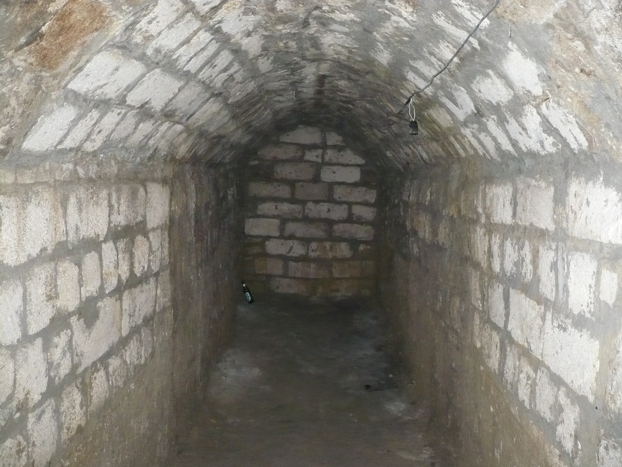 Zbaraż, podziemia zamku